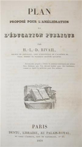 Page de garde d'un ouvrage pédagogique d'Allan Kardec, avant son travail de codification du spiritisme.